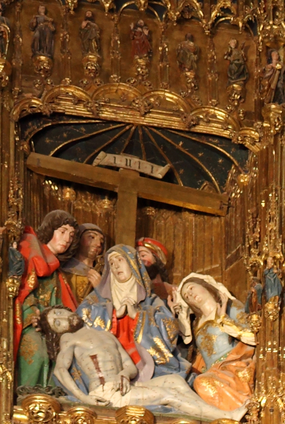 Piedad, detalle del retablo mayor de la catedral de Toledo (España)